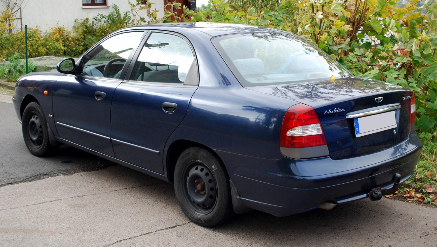 Daewoo Nubira